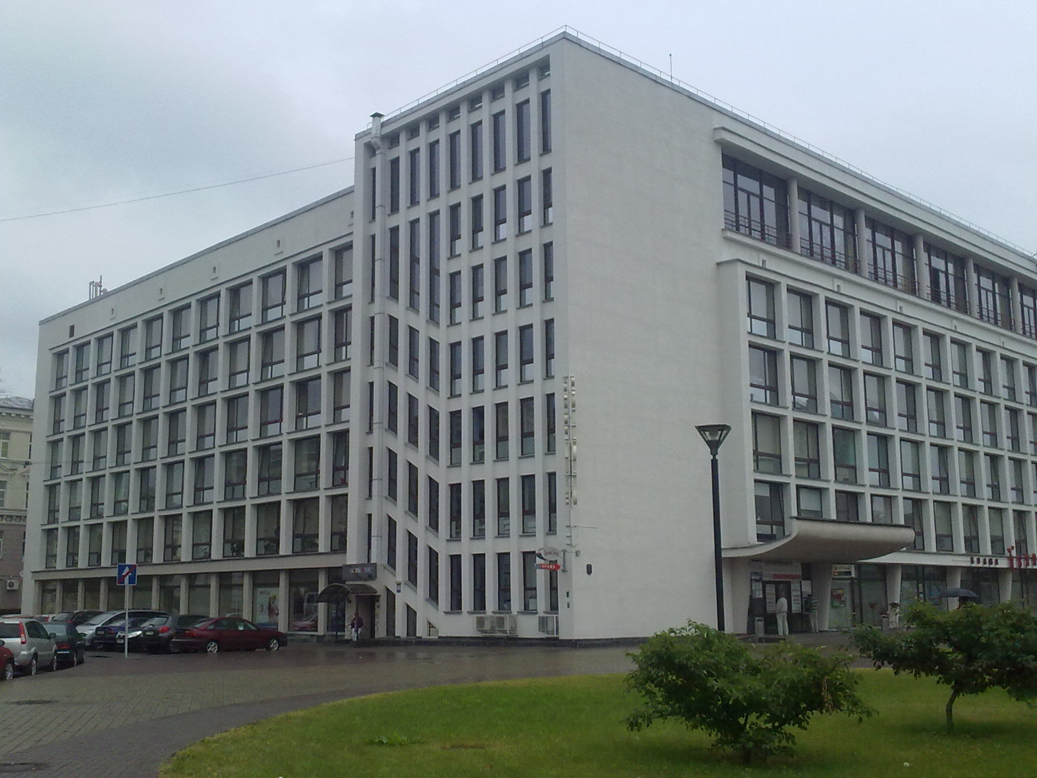 Мінск. Гістарычны цэнтр. 2012